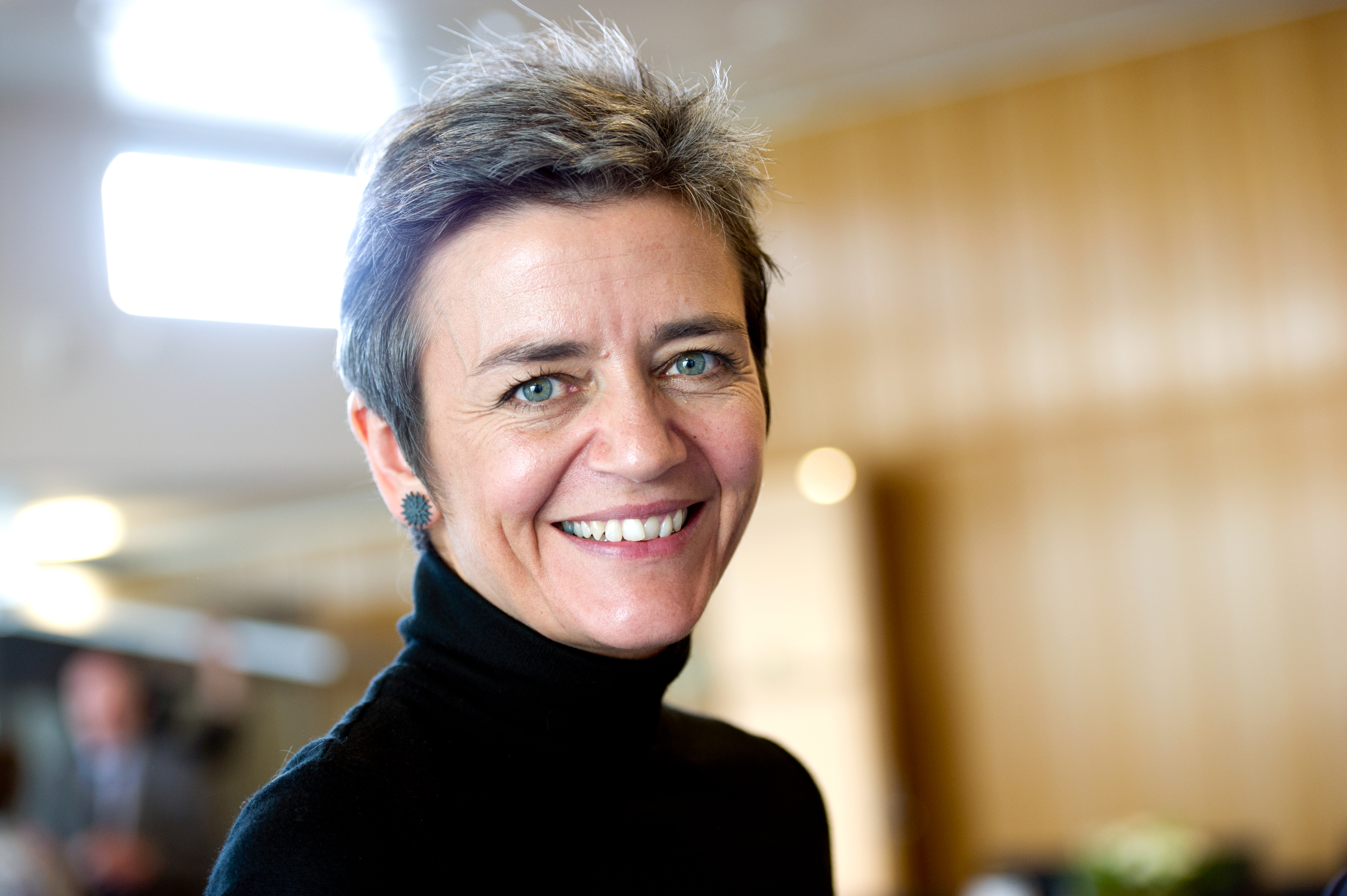 Margrethe Vestager, ekonomi- och inrikesminister Danmark. Nordiska rådets session i Köpenhamn 2011